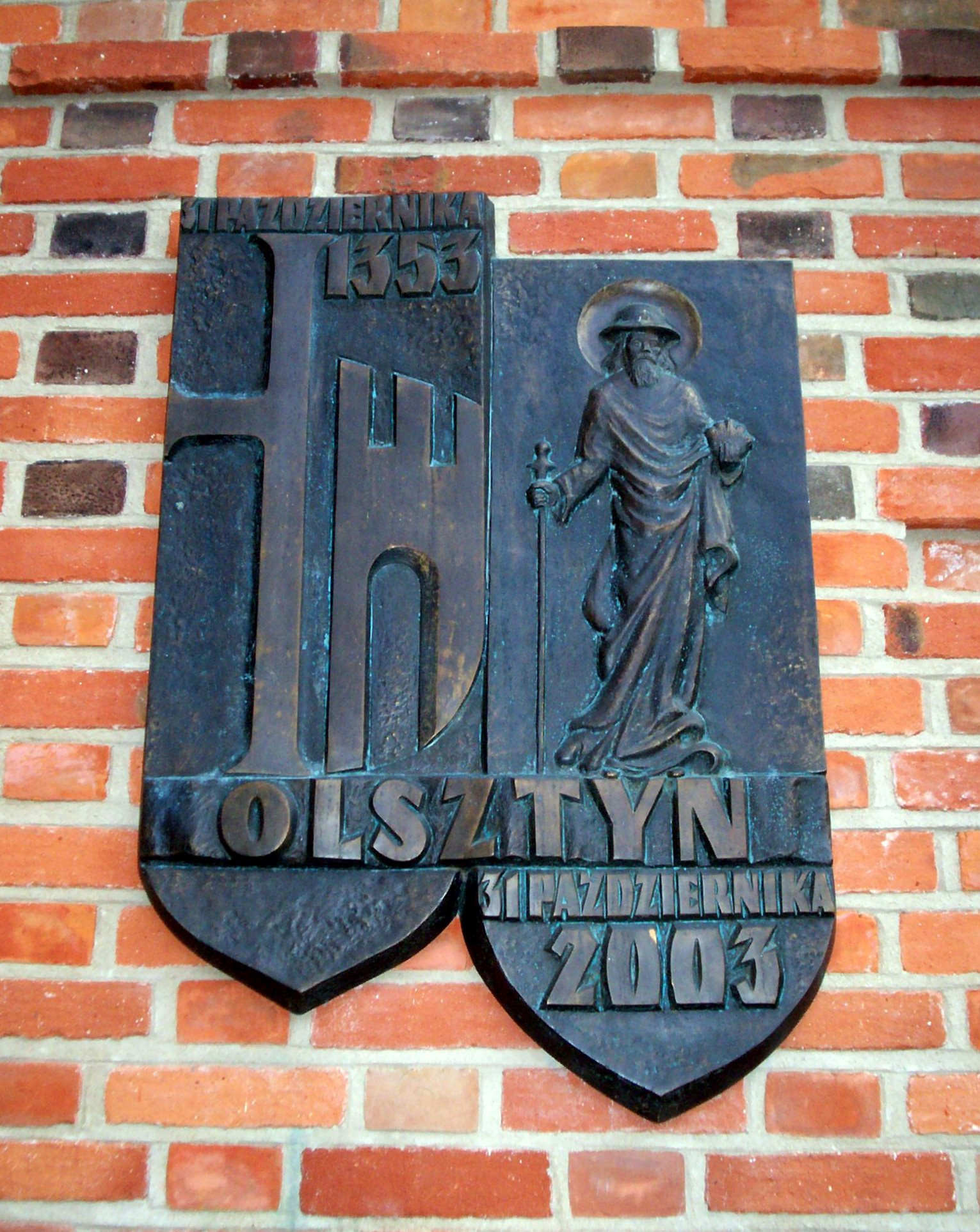 Tablica pamiątkowa poświęcona 650-leciu miasta Olsztyn